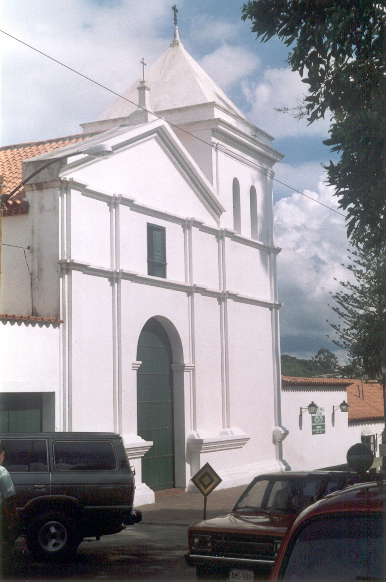 La Iglesia de Santa Rosalía de Palermo es un templo colonial de estilo barroco ubicado en la ciudad de El Hatillo, Estado Miranda, en la zona metropolitana de Caracas (Venezuela). Constituye un Monumento Nacional de Venezuela. Autor: Fev. Año 2003, agosto.